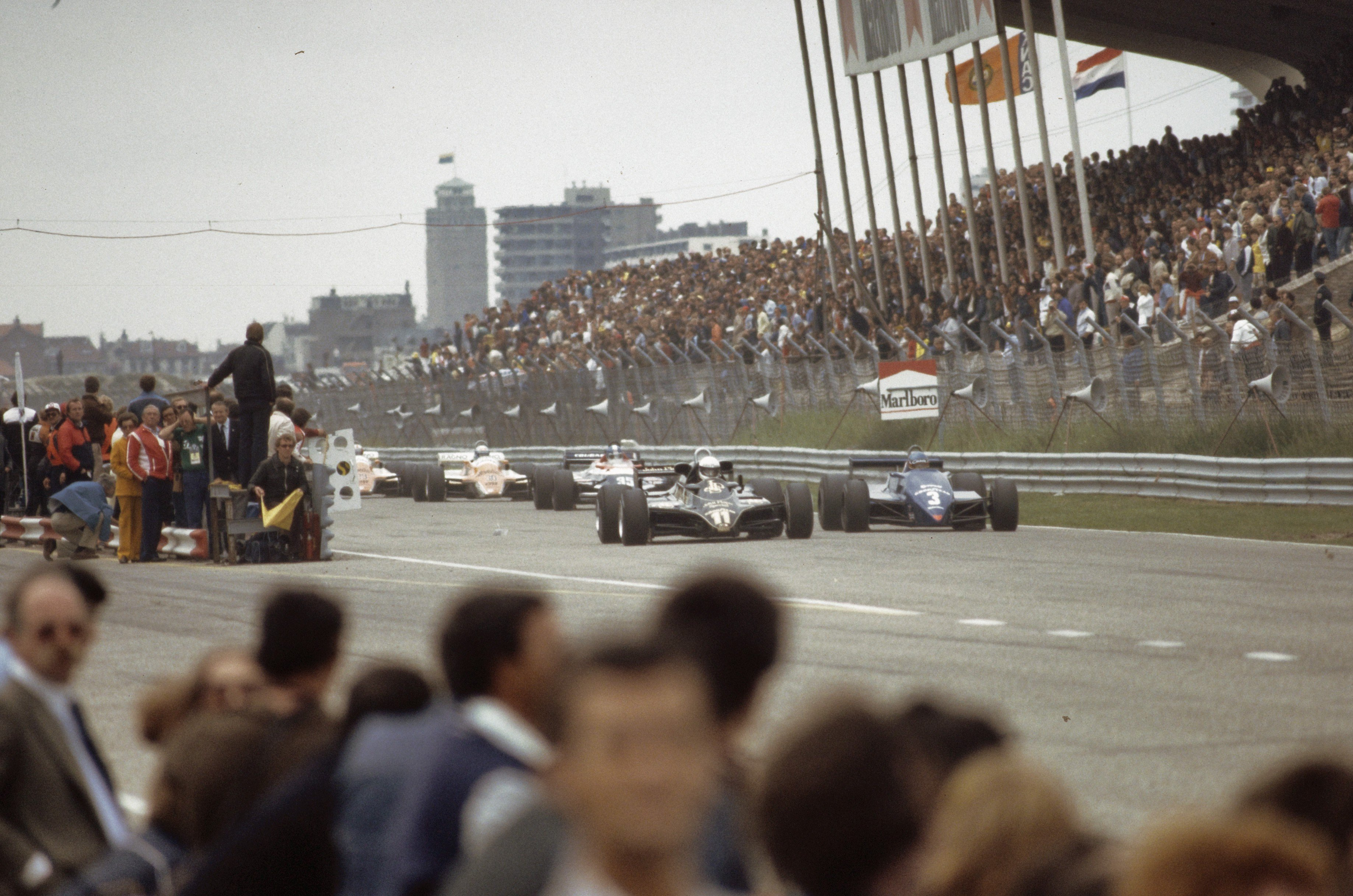 Collectie / Archief : Fotocollectie Anefo Reportage / Serie : [ onbekend ] Beschrijving : Grand Prix op Zandvoort; overzicht tijdens start Datum : 3 juli 1982 Locatie : Noord-Holland, Zandvoort Trefwoorden : autoraces Fotograaf : Dijk, Hans van / Anefo Auteursrechthebbende : Nationaal Archief Materiaalsoort : Dia (kleur) Nummer archiefinventaris : bekijk toegang 2.24.01.06 Bestanddeelnummer : 253-8754